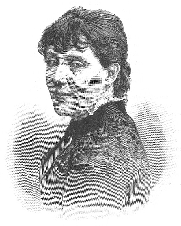 Emma Löwstädt-Chadwick (1855-1932)